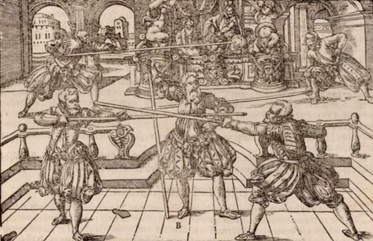 Photographie d'une gravure du traité de Joachim Meyer, libre de droits.